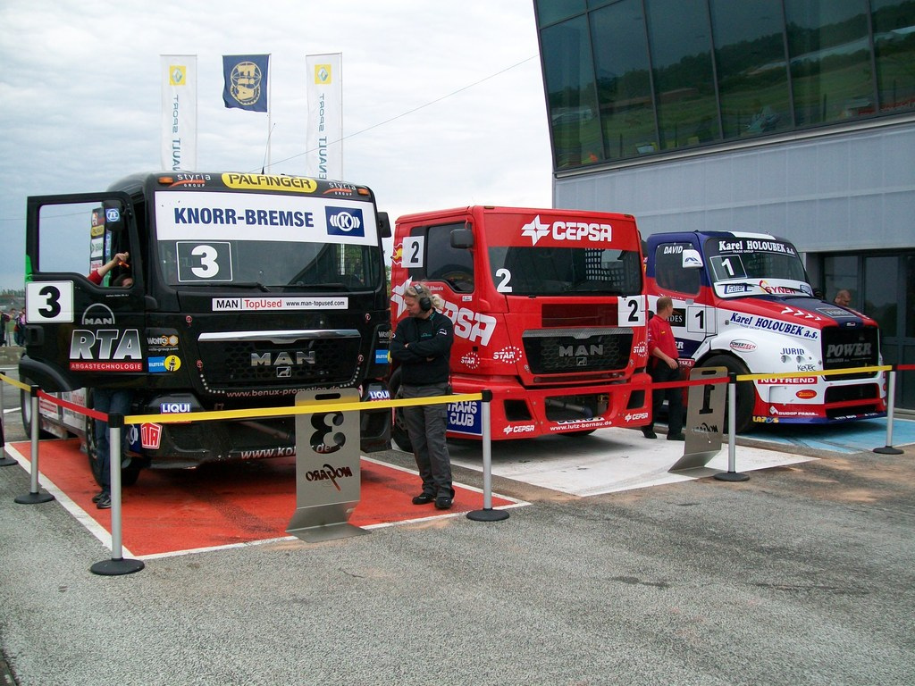 GP camions Nogaro 2019